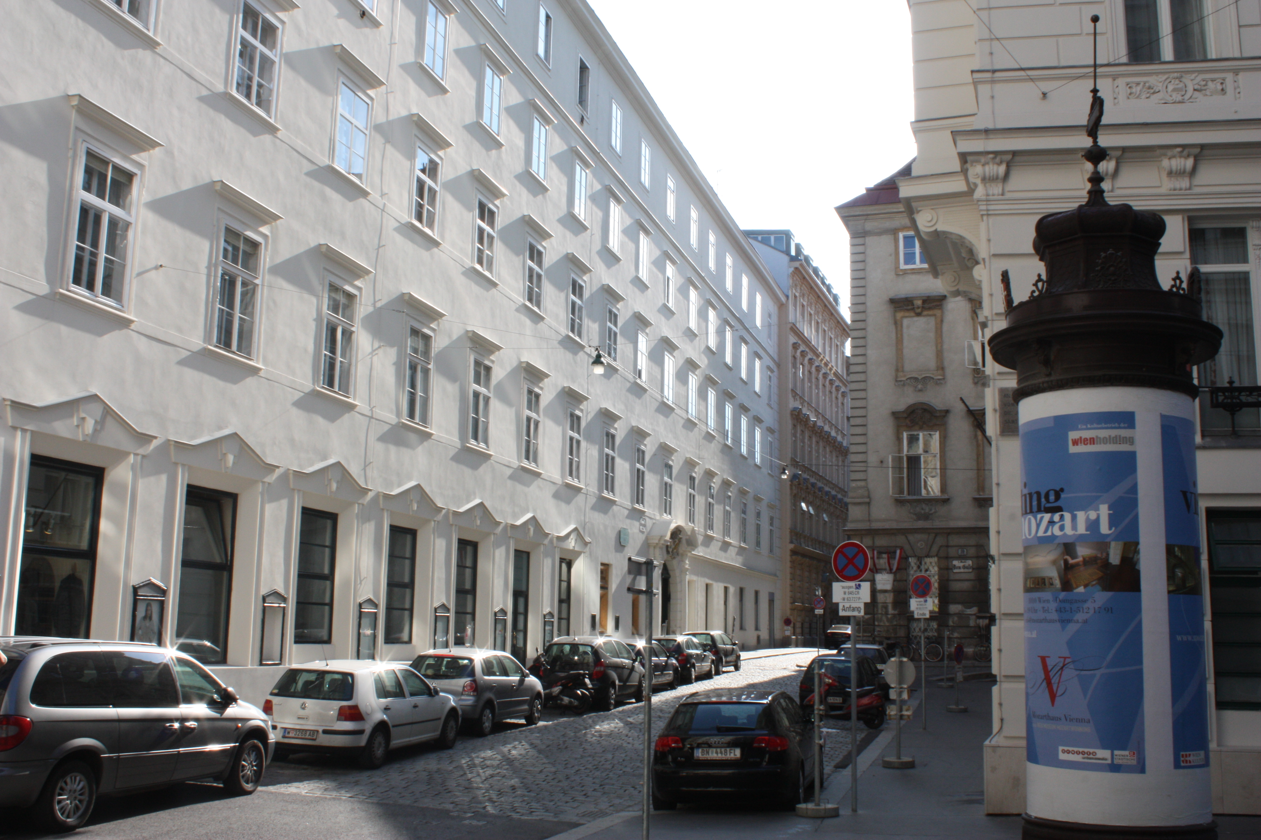 Zentrum, Vienna, Wien